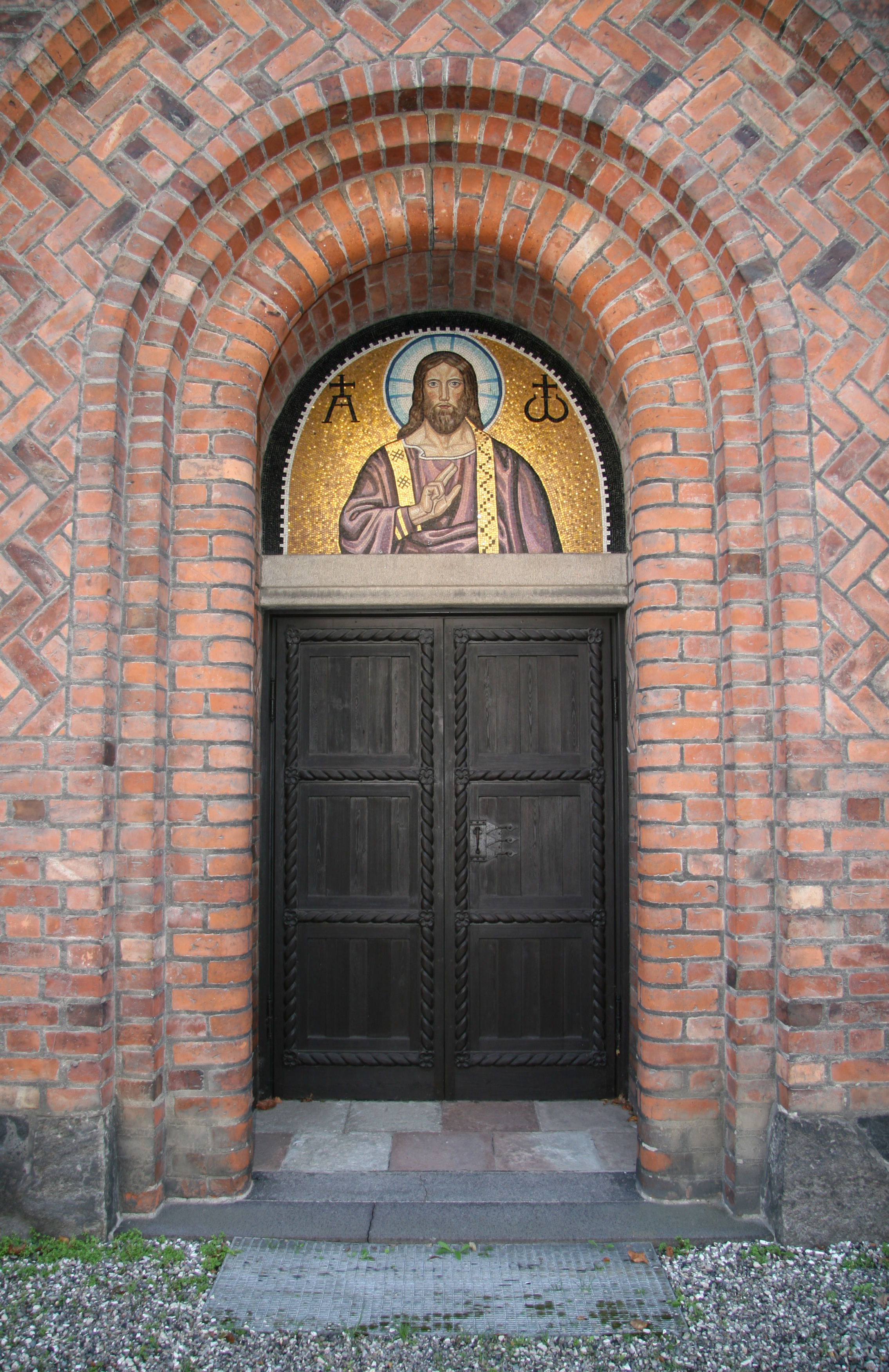 Immanuelskirken, Copenhagen, Denmark . Entrance.